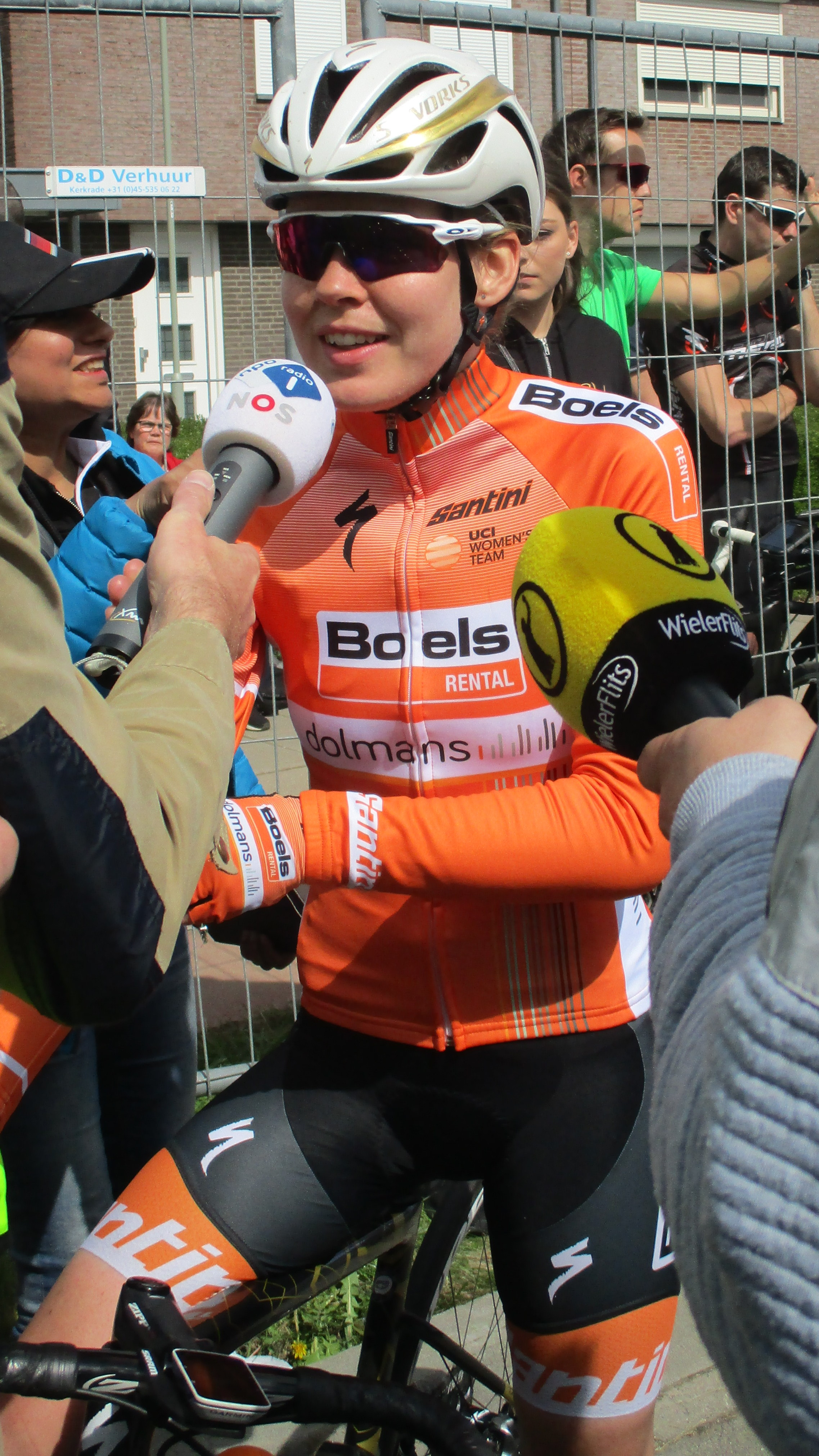 Finish van de Amstel Gold Race Ladies Edition 2018 in Berg, Valkenburg aan de Geul.